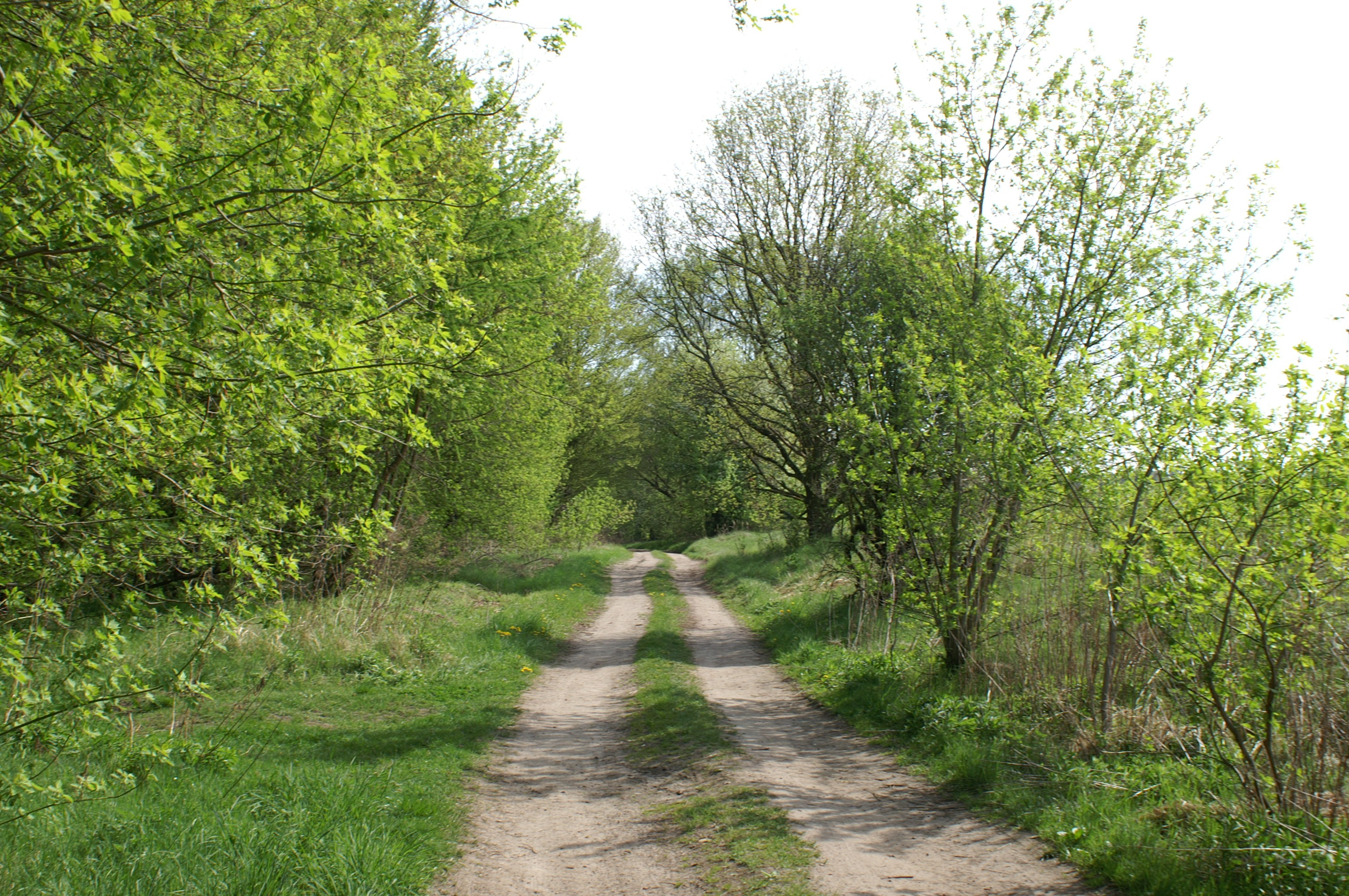 Die ehemalige Bernauer Heerstraße in der Nähe von Schönholz in Richtung Eberswalde - Barnim